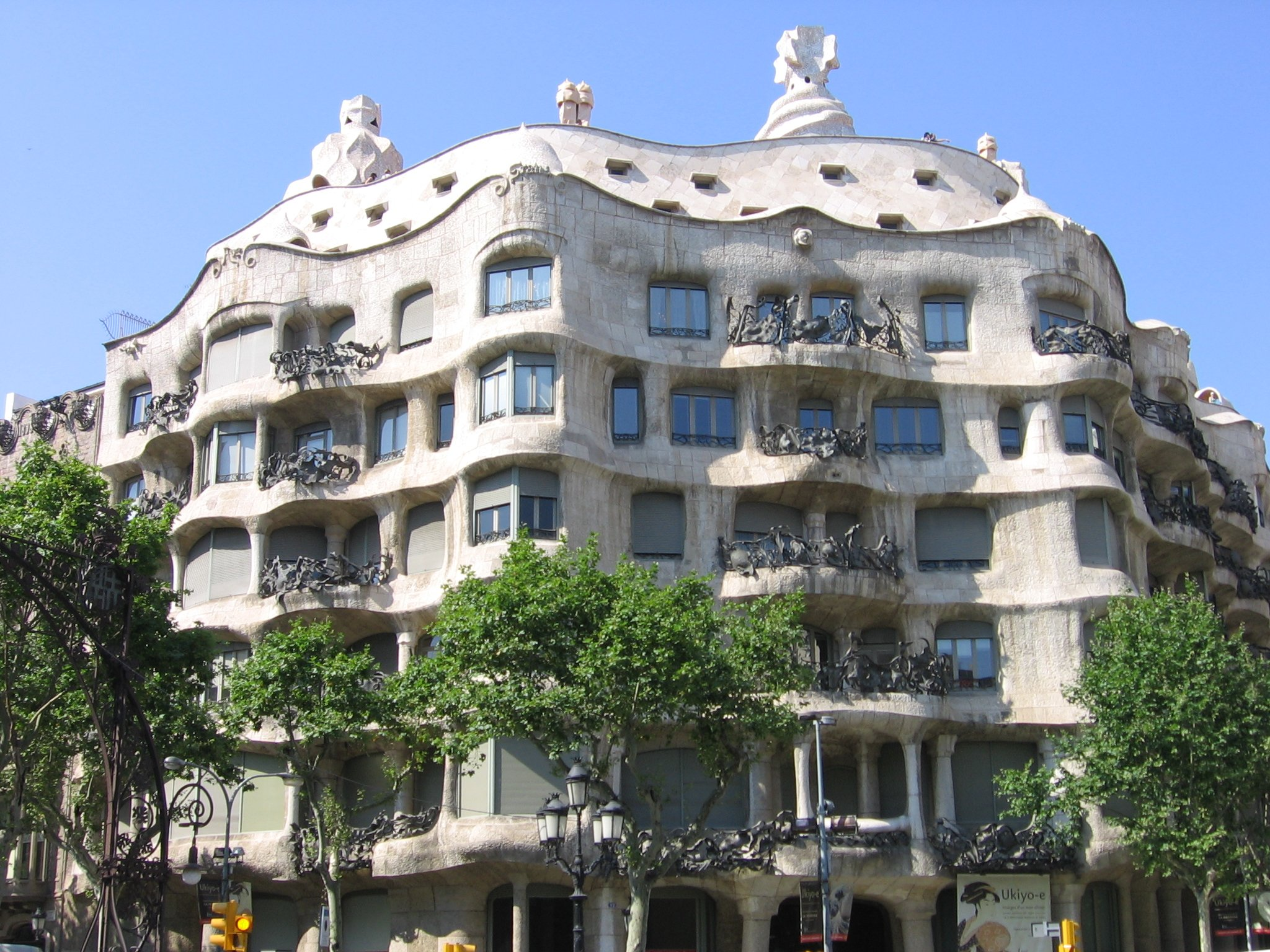 Fachada de la Casa Milà (Barcelona).